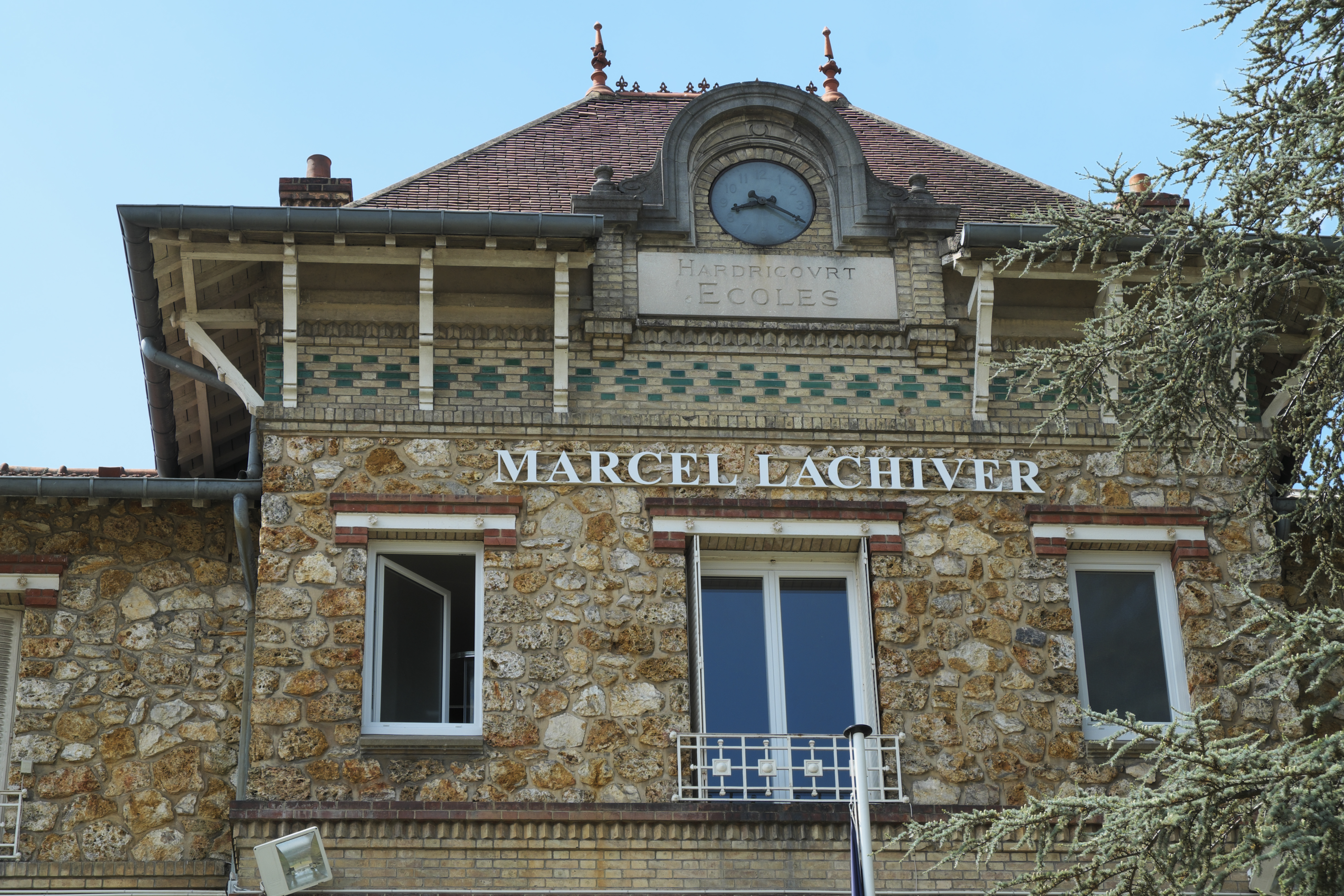 École Marcel Lachiver in Hardricourt im Département Yvelines (Île-de-France/Frankreich)